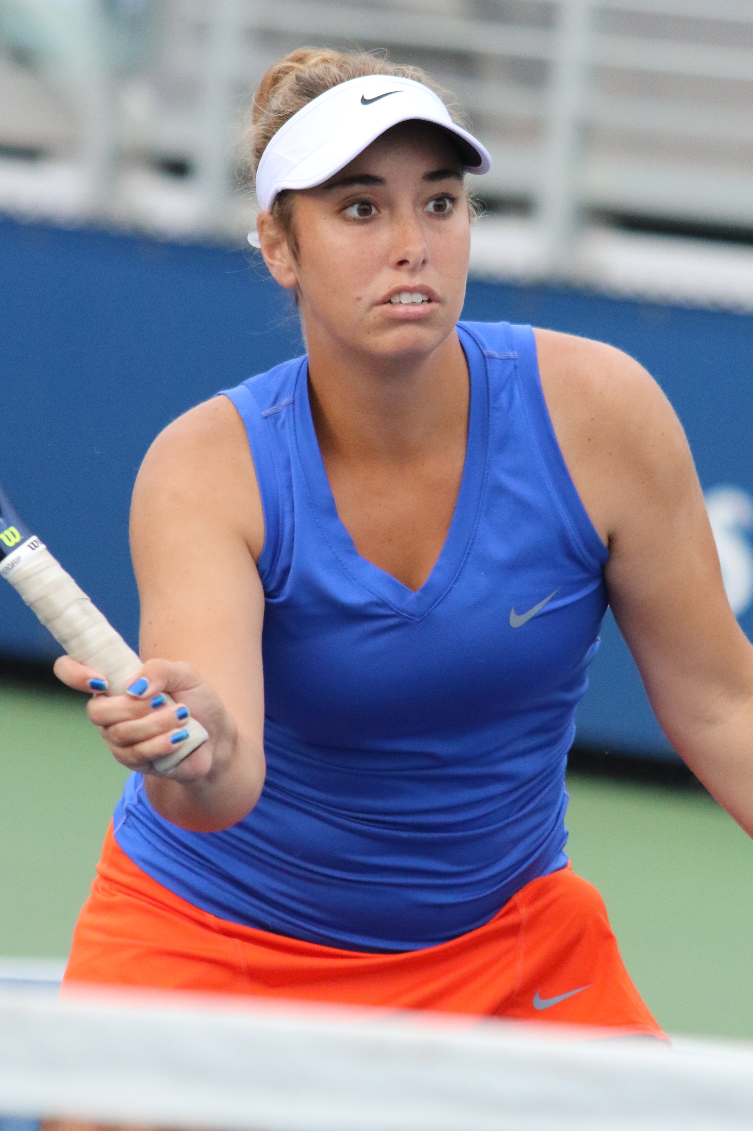 Austin US16 (7)